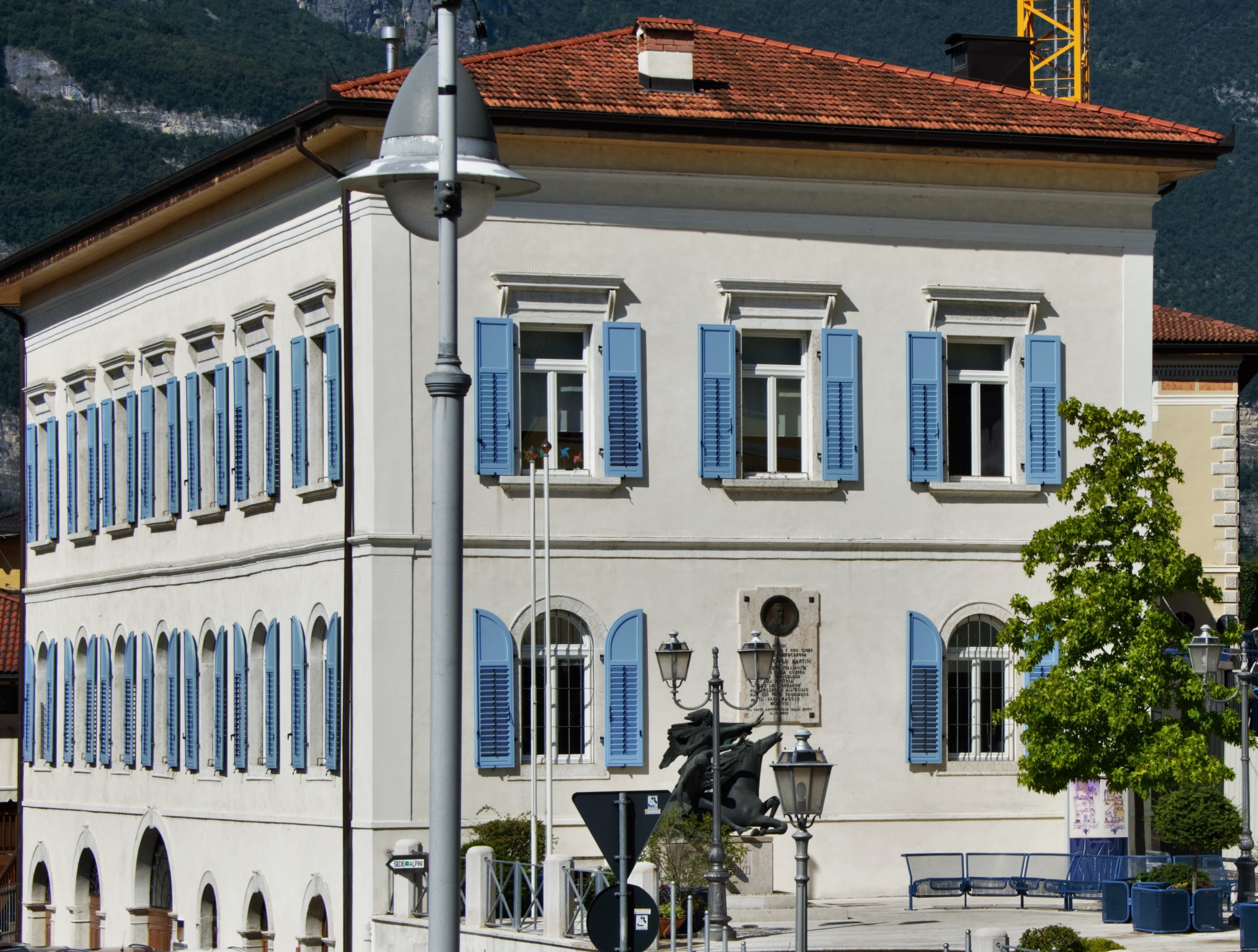 Palazzo della Vicinia. Sede della Biblioteca Intercomunale di Mezzocorona. This is a photo of a monument which is part of cultural heritage of Italy.